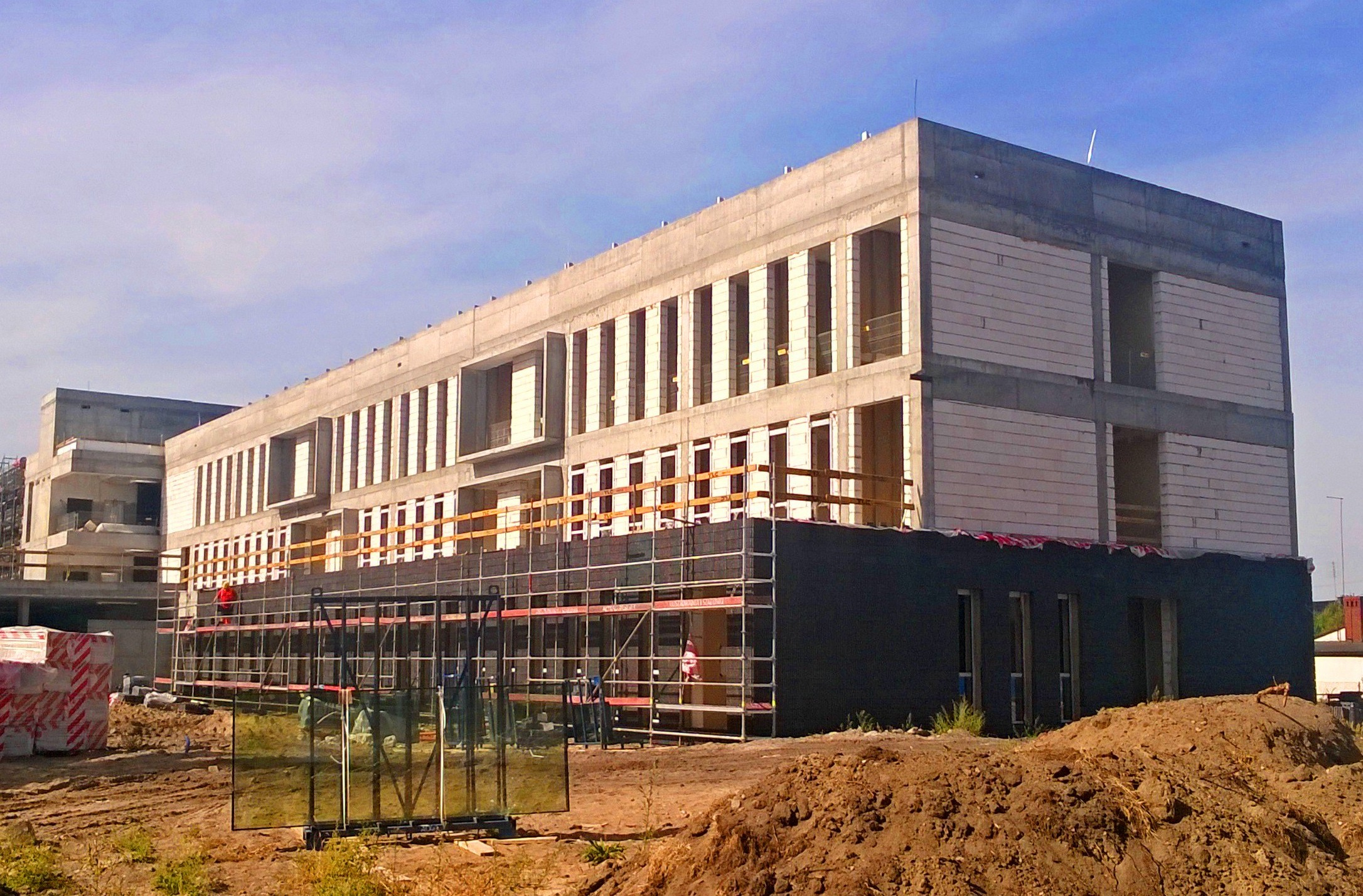 Budowa Szpitala Zakaźnego w Toruniu, wrzesień 2018